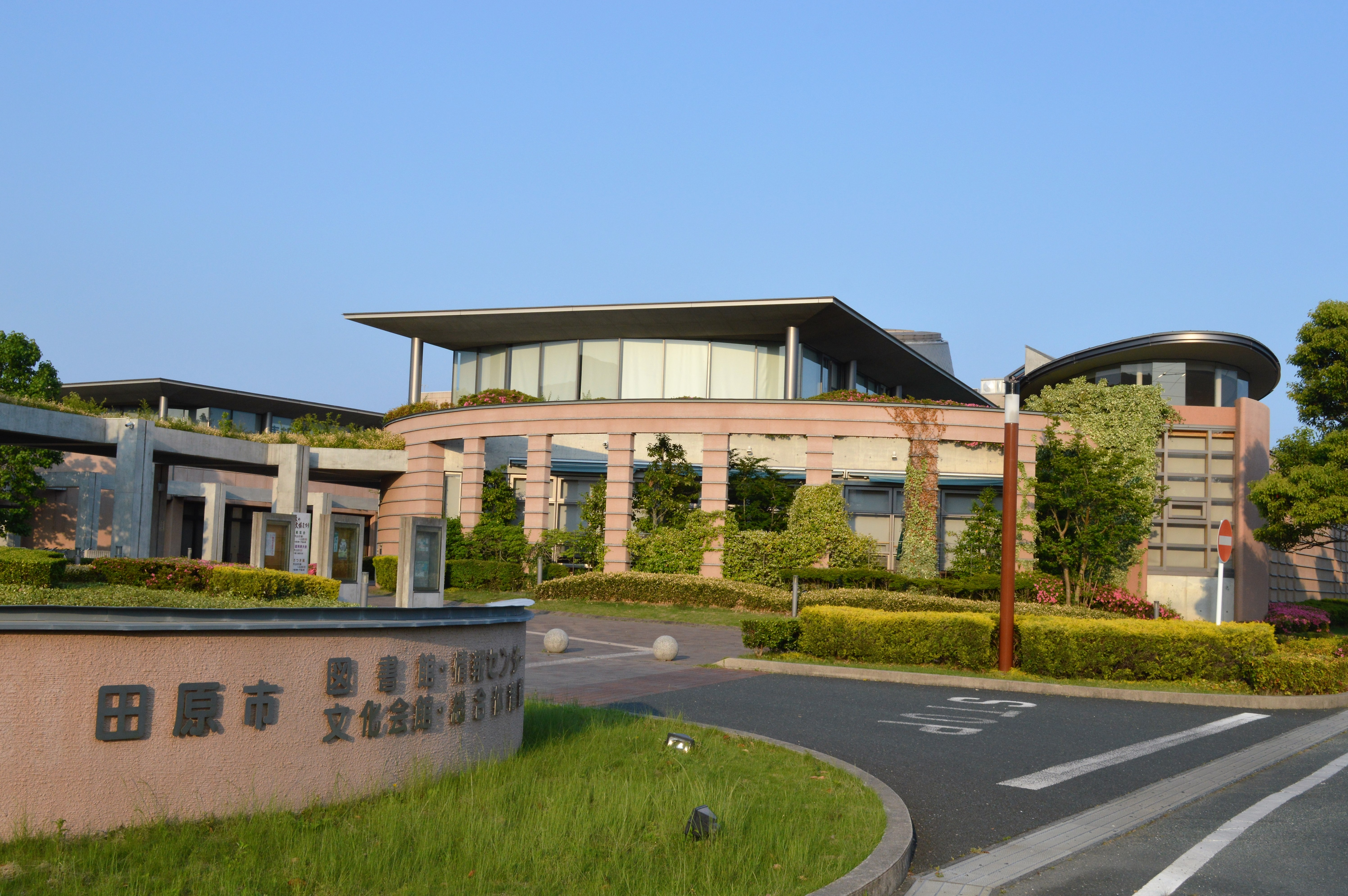 愛知県田原市 田原市中央図書館（田原市図書館）